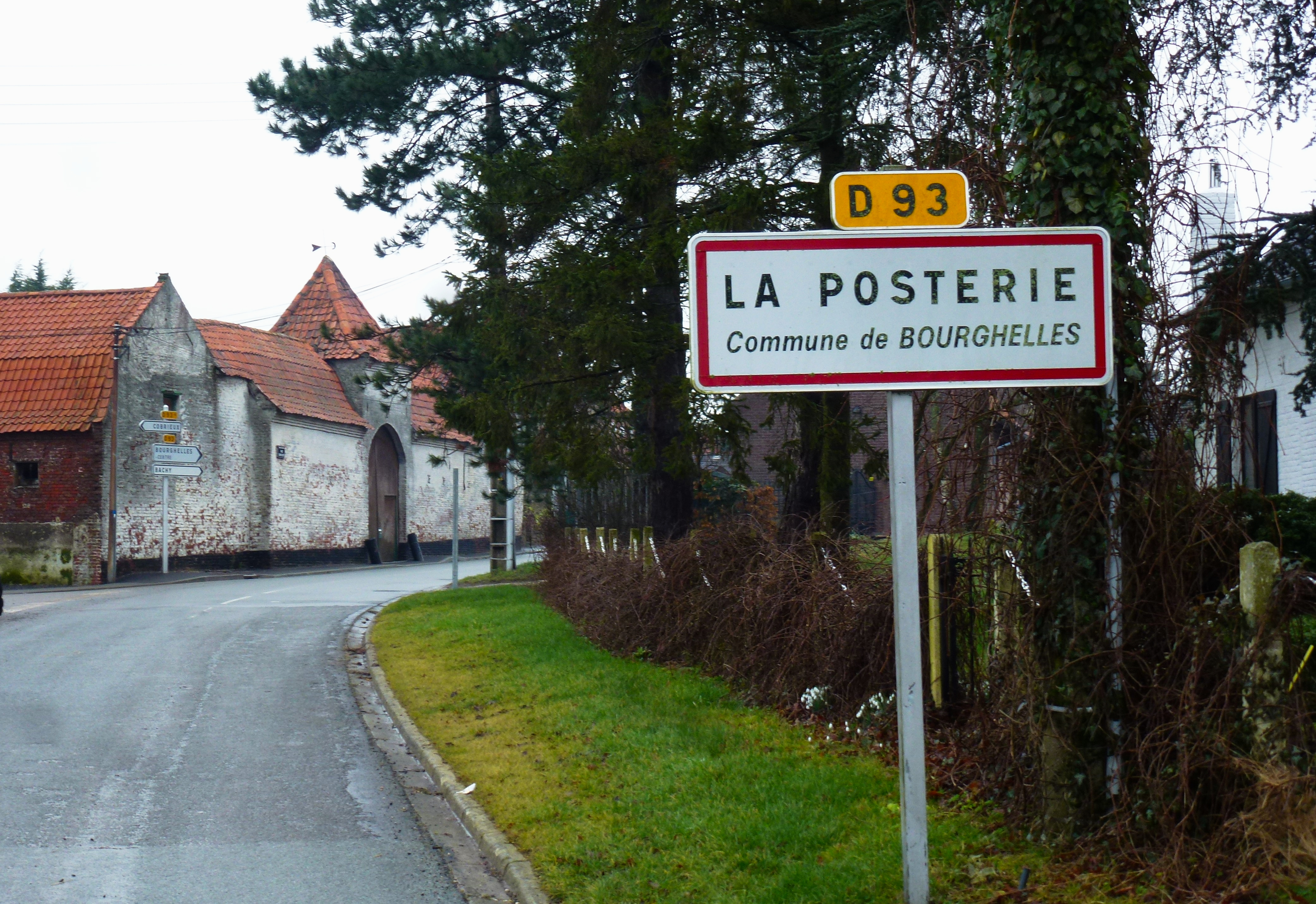 City limit signs à Bourghelles dans le Nord Hauts-de-France.- France. En arrière plan la "Commanderie des Templiers" datée de 1312.